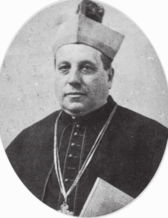 Eugenio Carlo Valussi - vescovo di Trento